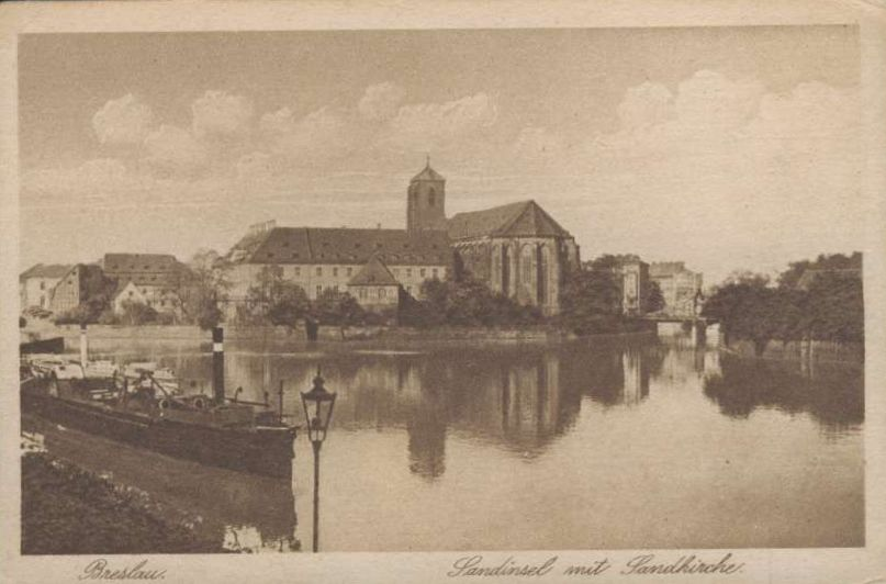 Titel: Breslau. Sandinsel mit Sandkirche. Dampfboote